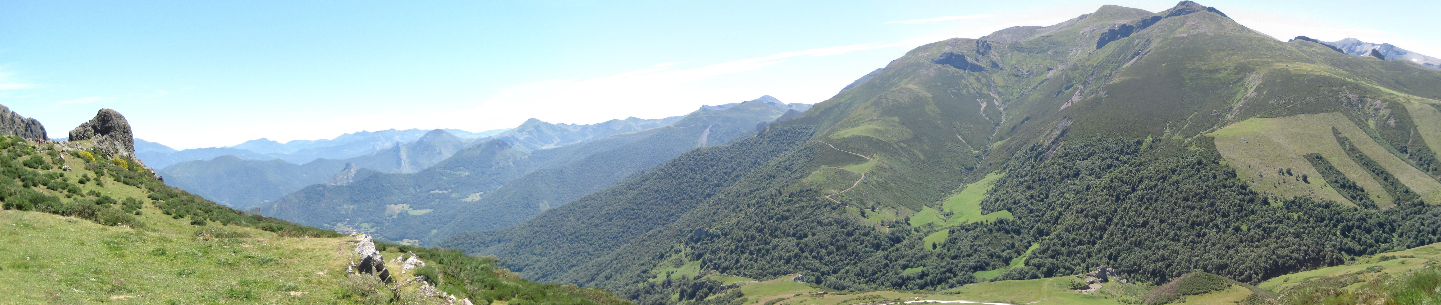 Panorámica de la cordillera Cantábrica desde el collado de Llesba, en el puerto de San Glorio (León-Cantabria, España).